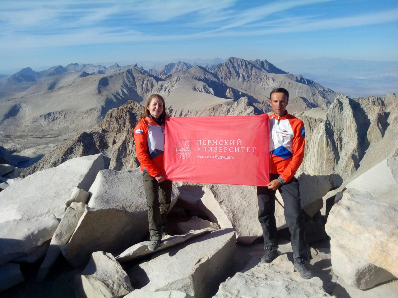 С флагом Пермского университета в день его столетнего юбилея 13 октября 2016 года на вершине пика Уитни.